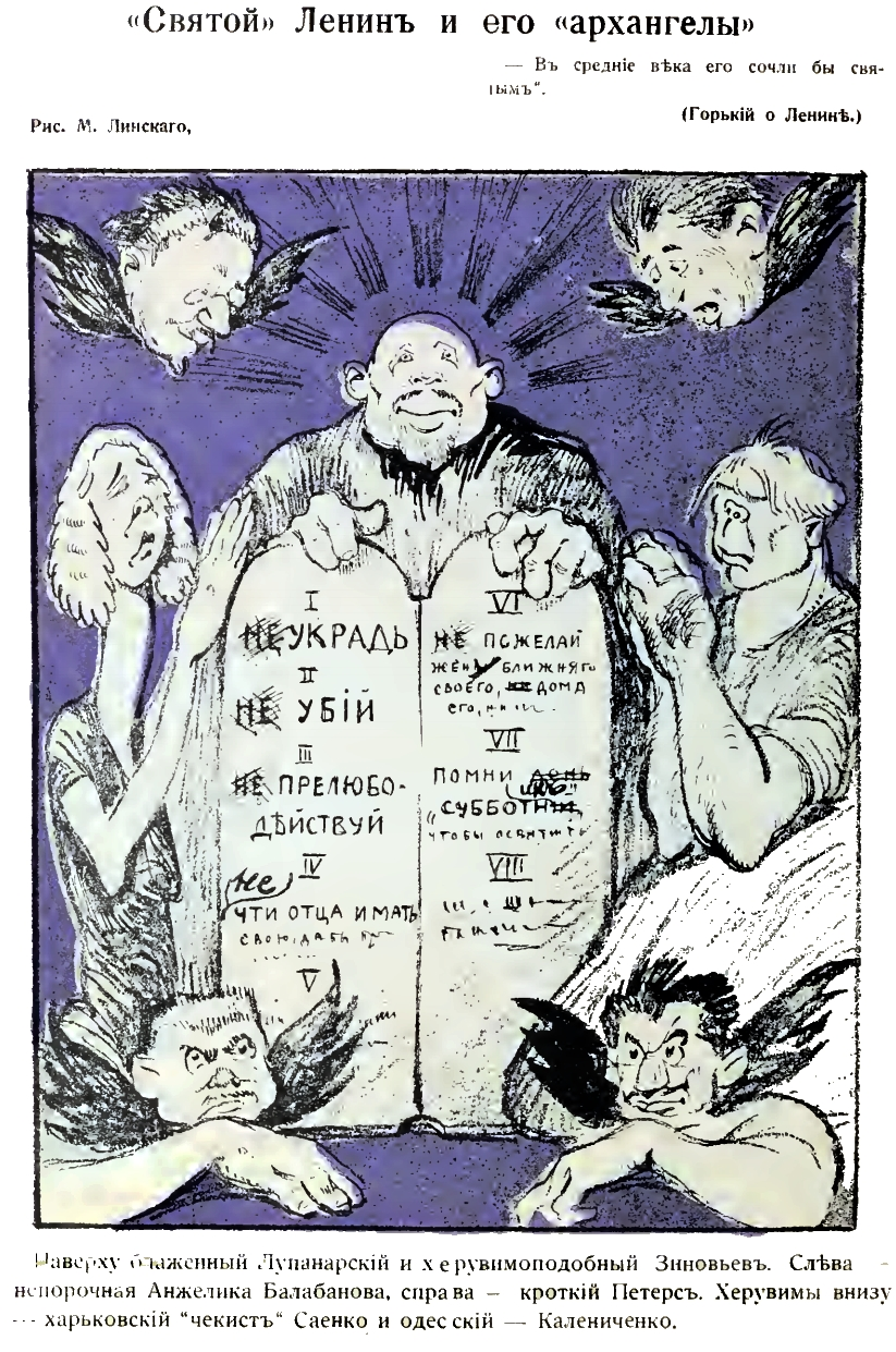 Карикатура М. С. Линского